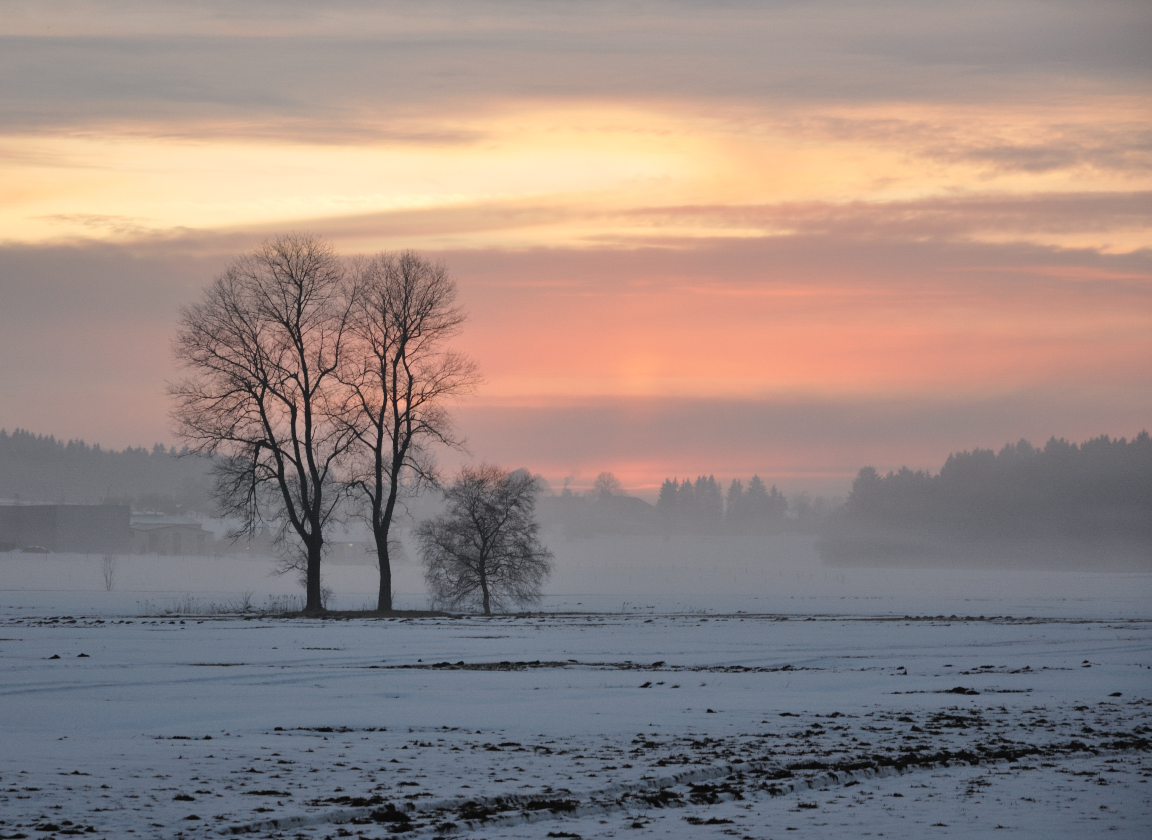 Sonnenuntergang am Ruschweiler See, Ilmensee-Ruschweiler